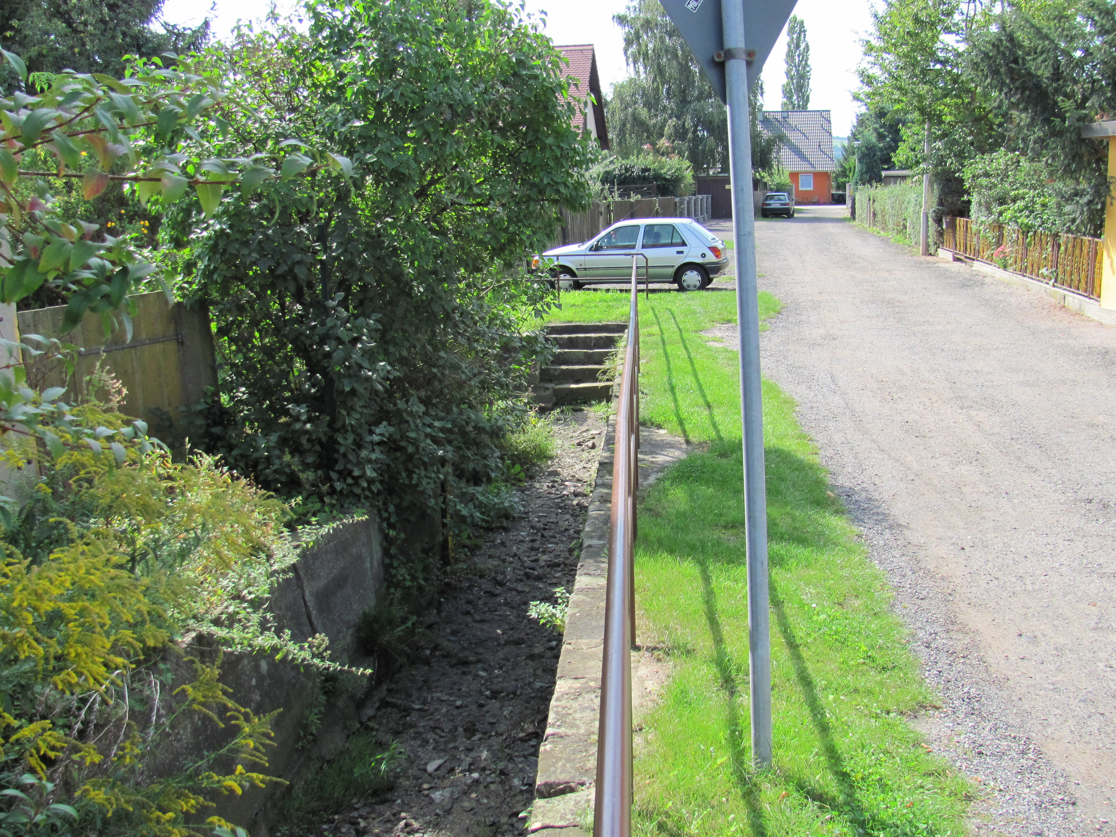 Radebeul, Serkowitzer Mühlgraben, zweigte geradeaus an der Treppe vom Lößnitzbach ab, der nach links abbiegt